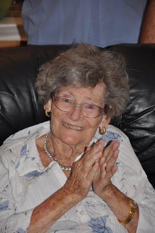 עליזה וירץ ביום הולדתה ה90